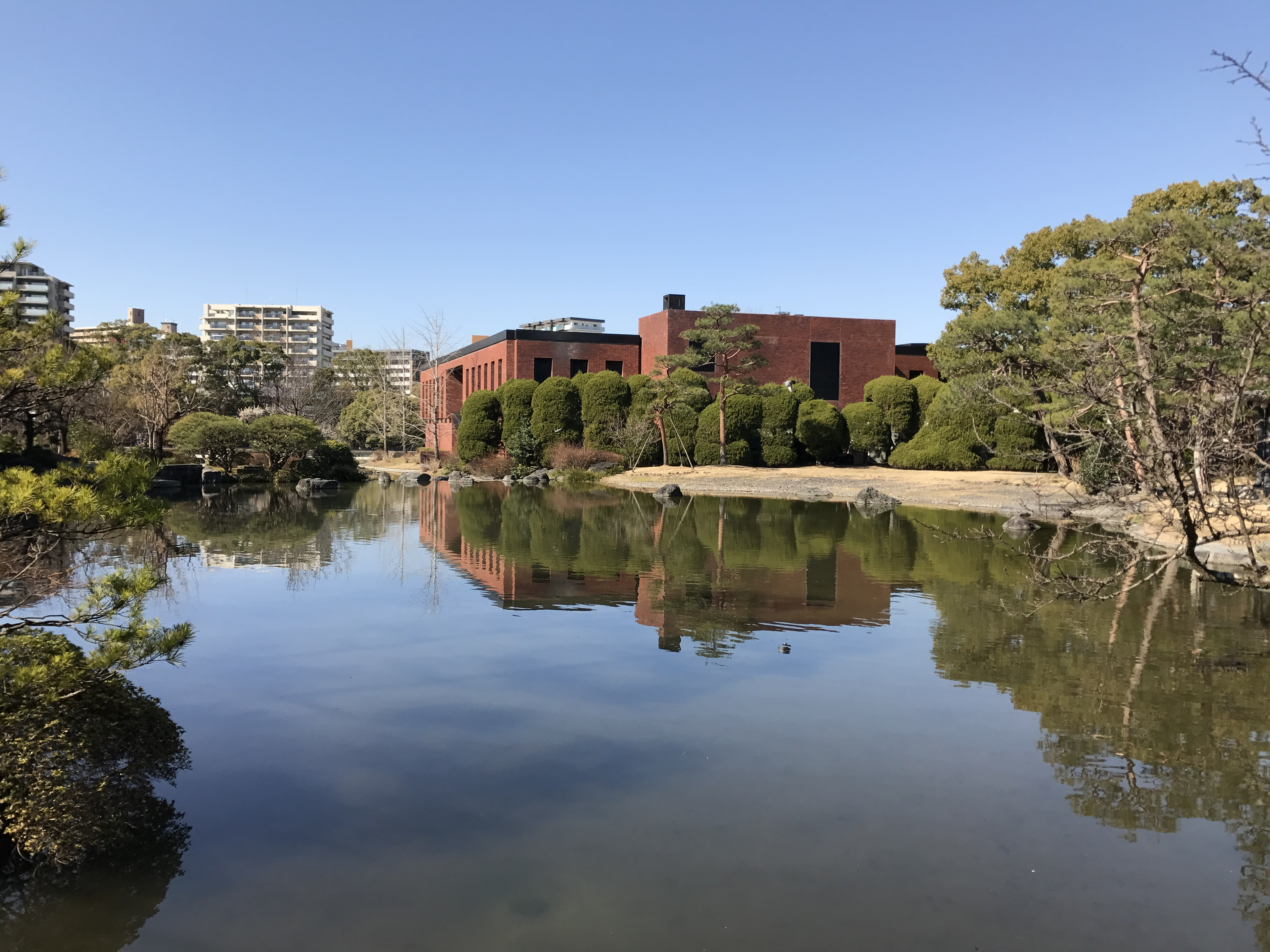 石橋文化センター・楽水の池と久留米市美術館